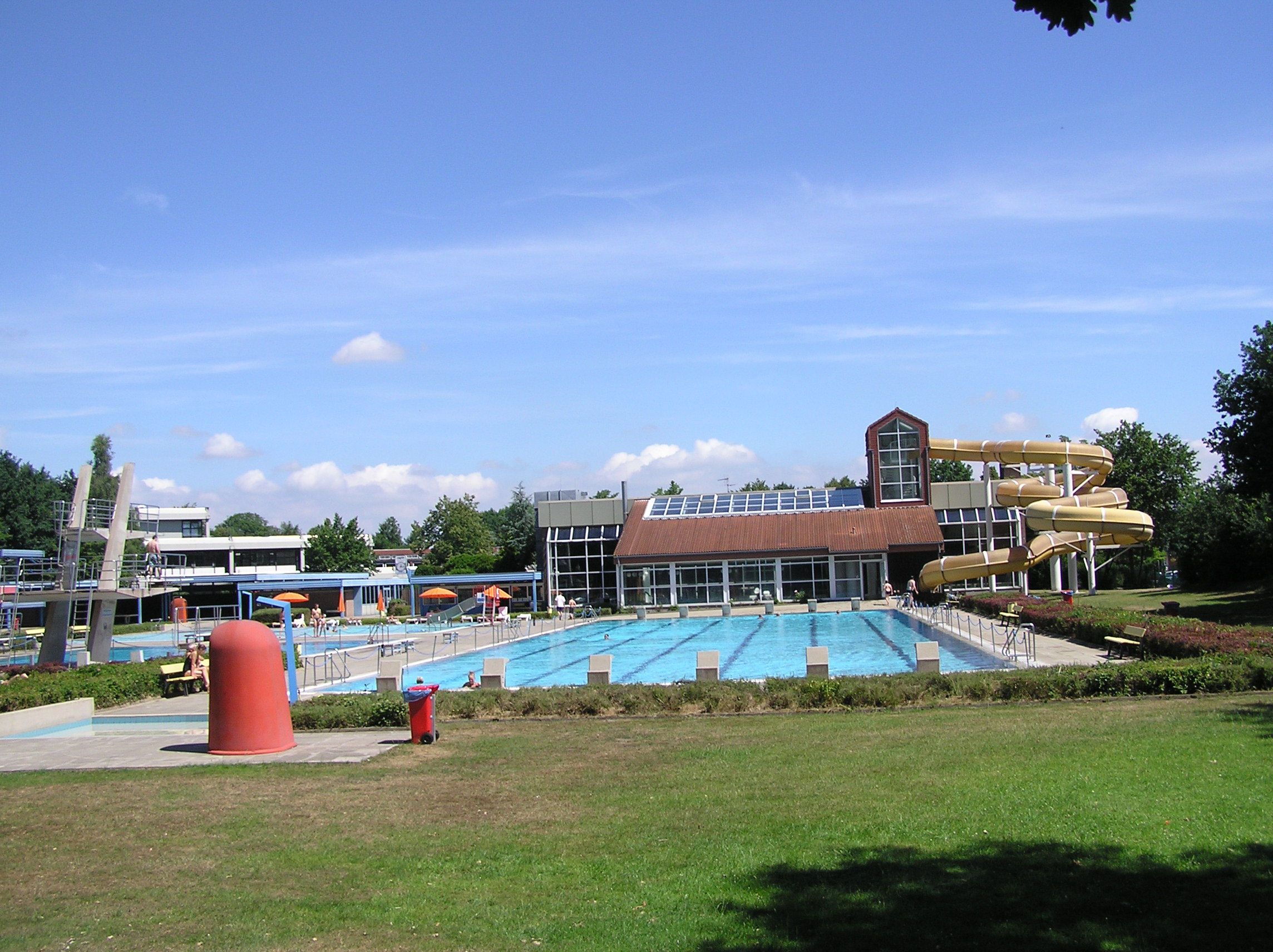 Quakenbrück, Schwimmhalle und Freibad